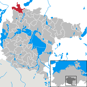 Vollrathsruhe im Landkreis Müritz, Mecklenburg-Vorpommern